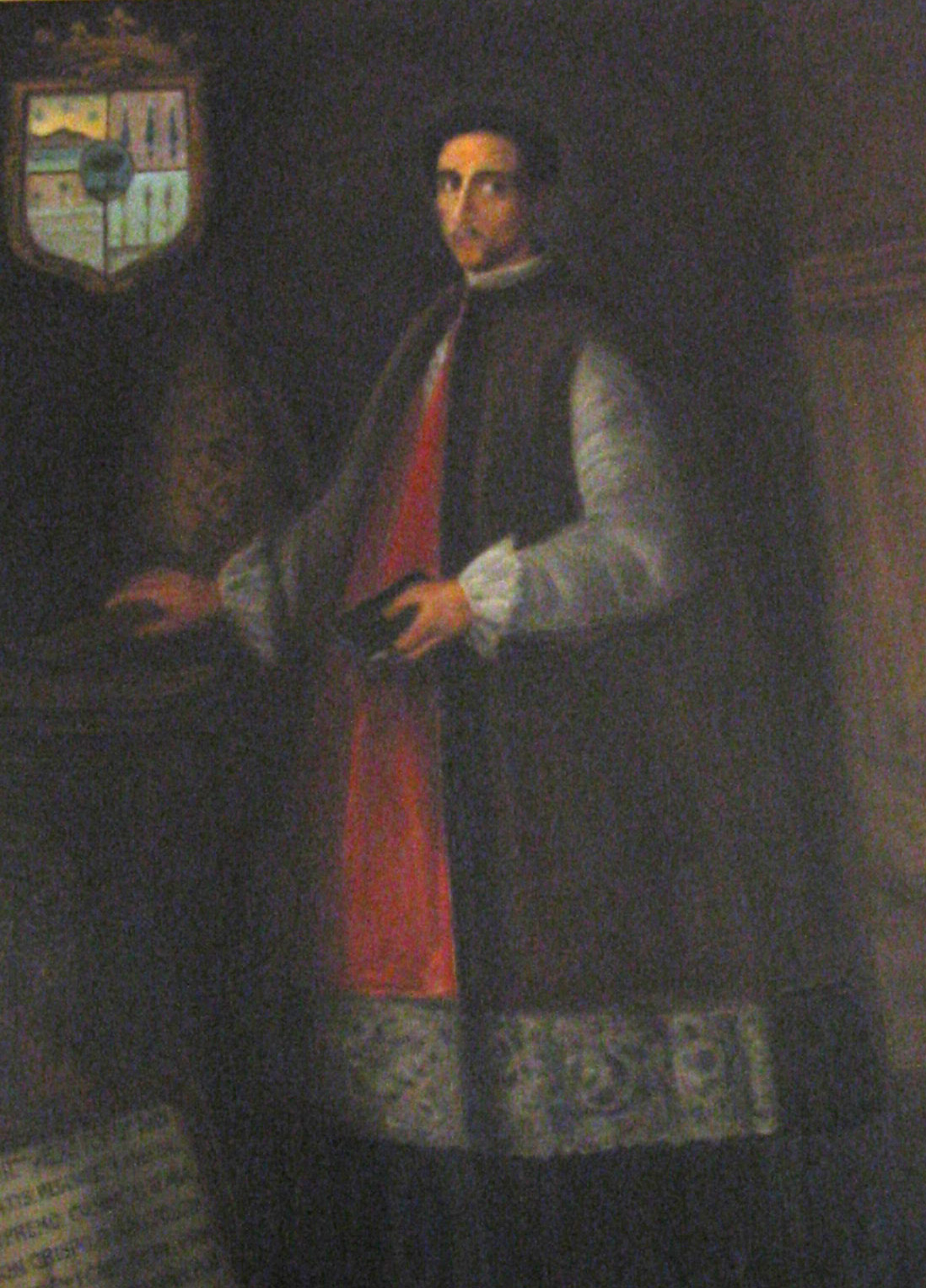 Retrat del bisbe Joan Sentís i Sunyer. Còpia d'Antoni Cerveto d'un quadre conservat al castell de la comtessa de Ripalda.